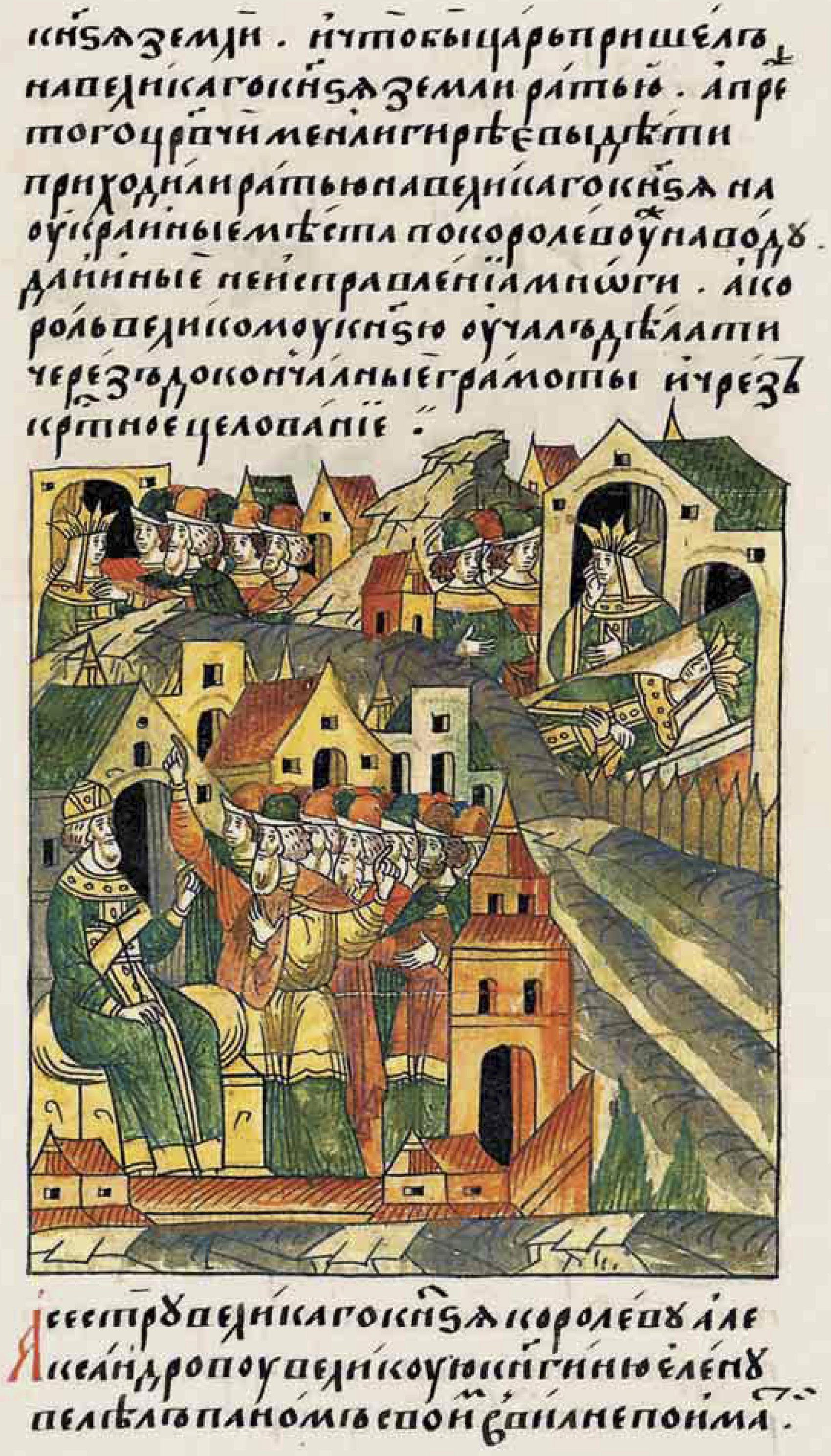 [Об измене королев- ской. Той же осенью пришла весть к вели- кому князю всея Руси Василию Ивановичу, что Жидимонт, король Польский, ссылается против христиан- ства с басурманами, с Крымским царем Менли-Гиреем, и под- стрекает против вели- кого князя,] чтобы царь пошел на земли великого князя, на христиан, ратью. Ведь и прежде того дети Менли-Ги- реевы, — царевичи, приходили ратью на окраинные места великого князя по ко- ролеву же наущению, да и иные нарушали клятвы многие. И ко- роль начал нарушать договорные грамоты с великим князем и крестное целование. А сестру великого князя, великую княгиню Елену короля Александра, велел панам своим в Вильне взять [и под стражей держать за Вильной в Береш- тах. И королева Елена в том заключении скончалась, Бог знает, по какой причине. ]